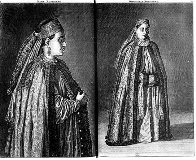 Иллюстрация из книги К. де Брюйна "Reizen over Moskovie, door Persie en Indie"